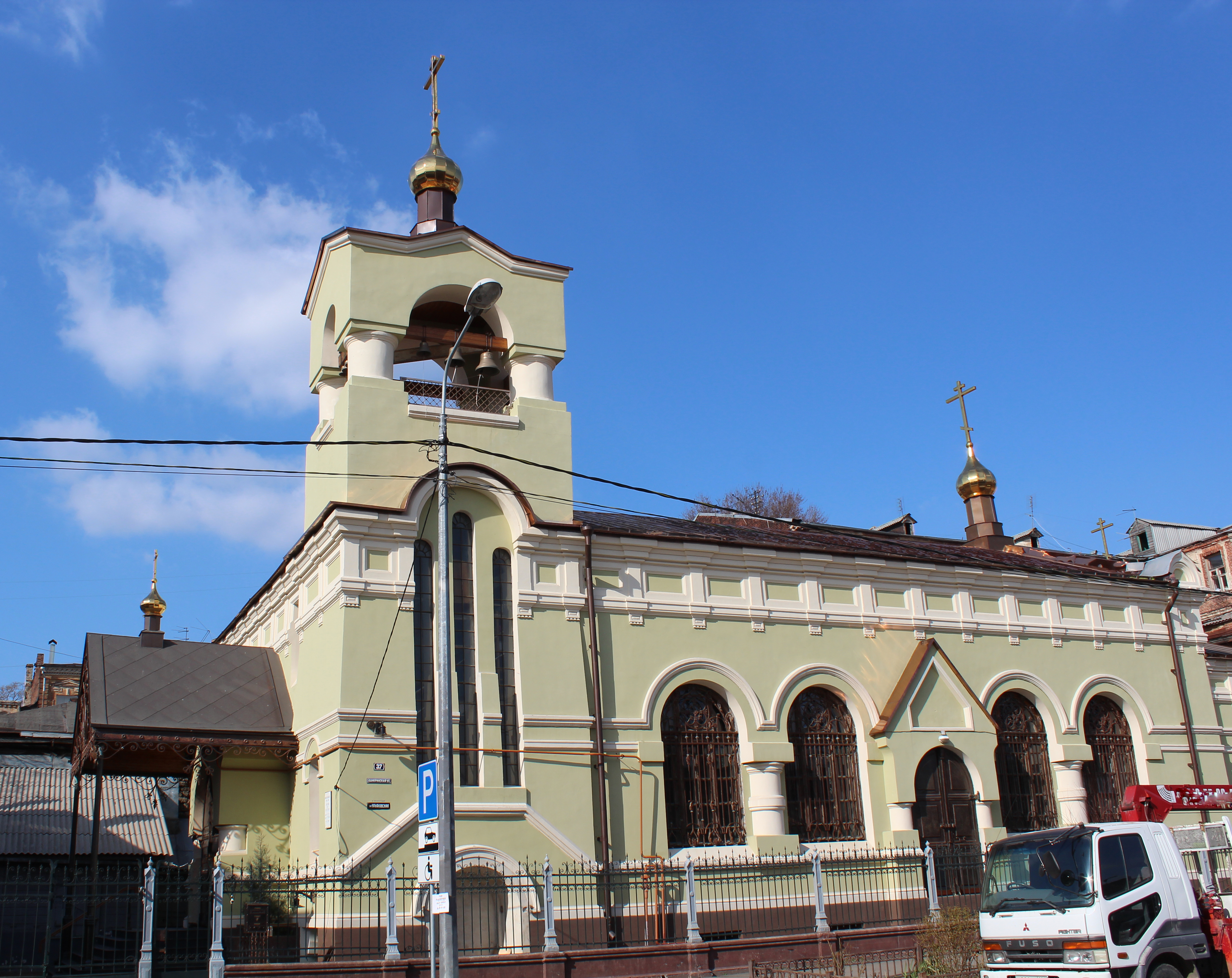 Здание города Ростова-на-Дону